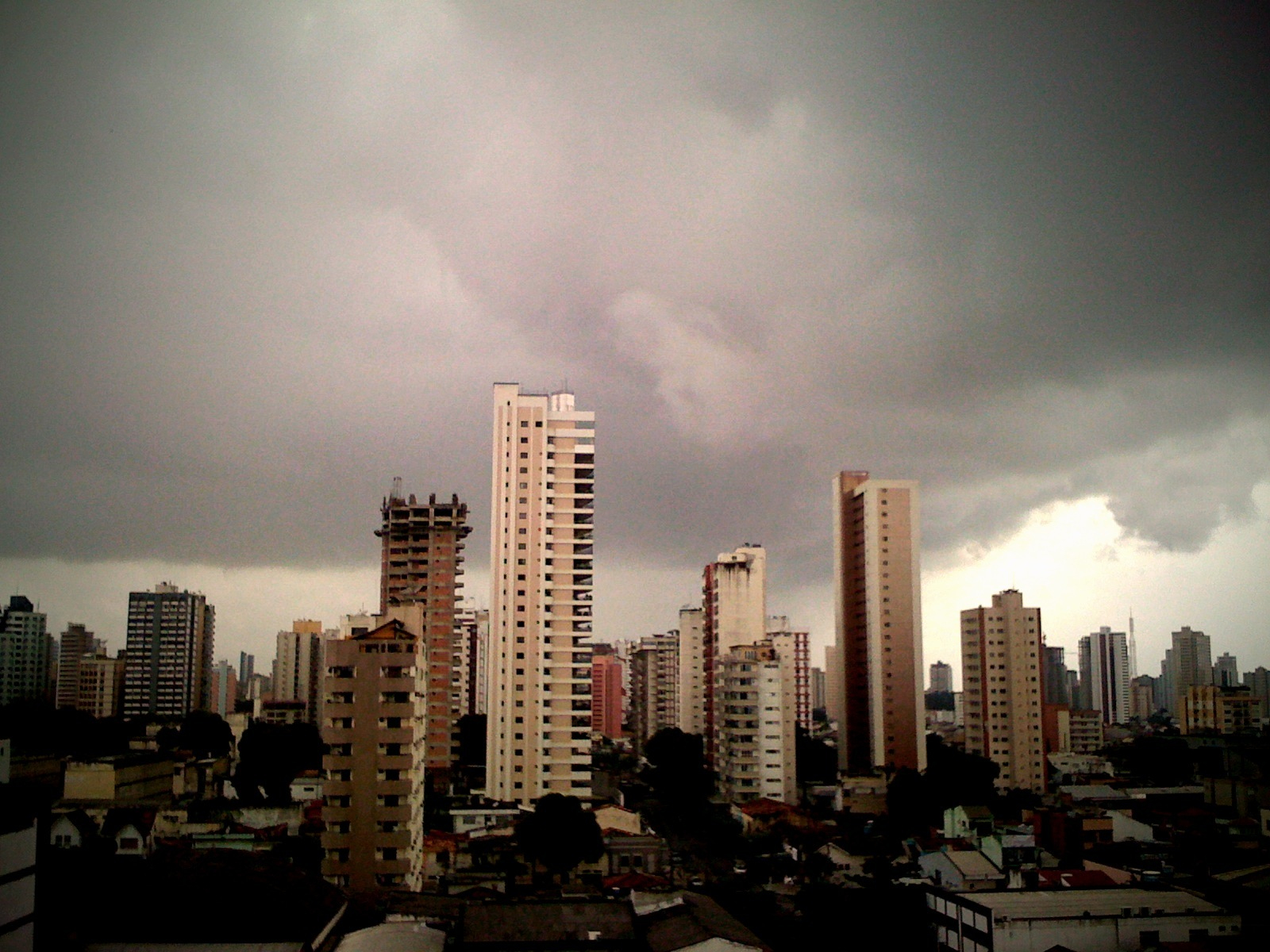 Chuva chegando em Belém do Pará.